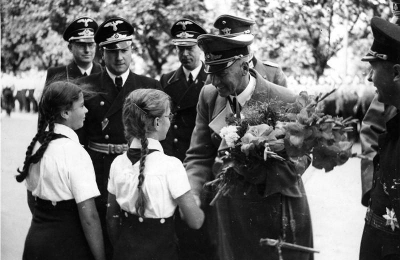 Zentralbild 14.10.1960 Ausschuss für Deutsche Einheit weist nach: Hitlers Kriegsrichter und Wehrstafexperten im Dienste der Bonner Kriegsvorbereitungen. Der Ausschuss für Deutsche Einheit wies am 14.10.1960 auf einer internationalen Pressekonferenz in Berlin anhand von dokumentarischem Material nach, dass die Paktiker und Theoretiker des brutalen Kriegs"rechts" der Nazis, die Herausgeber und Artikelverfasser der faschistischen "Zeitschrift für Wehrrecht" heute wieder in gleicher oder ähnlicher Funktion für Adenauer und Strauss tätig sind. U.B.z.: der deutsche Reichsinnenminister Wilhelm Frick wird bei seinem Aufenthalt am 2. bis 8.9.1941 in der slowakischen Hauptstadt Pressburg vor dem Carlton-Hotel von Kindern mit Blumen begrüßt. In seiner Begleitung (im Hintergrund links neben Frick) Ministerialrat D. Hans Globke. (Frick und Globke weilten in Pressburg, um die faschistischen Judengesetze in der Slowakei einzuführen).